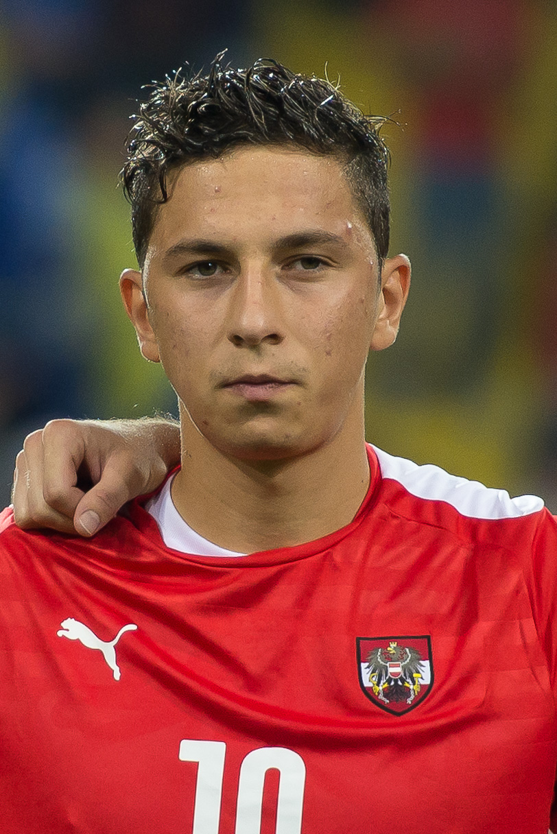 Fußball U21 EM-Qualifikation Österreich gegen Bosnien und Herzegowina St. Pölten, 5. September 2014 Robert Zulj